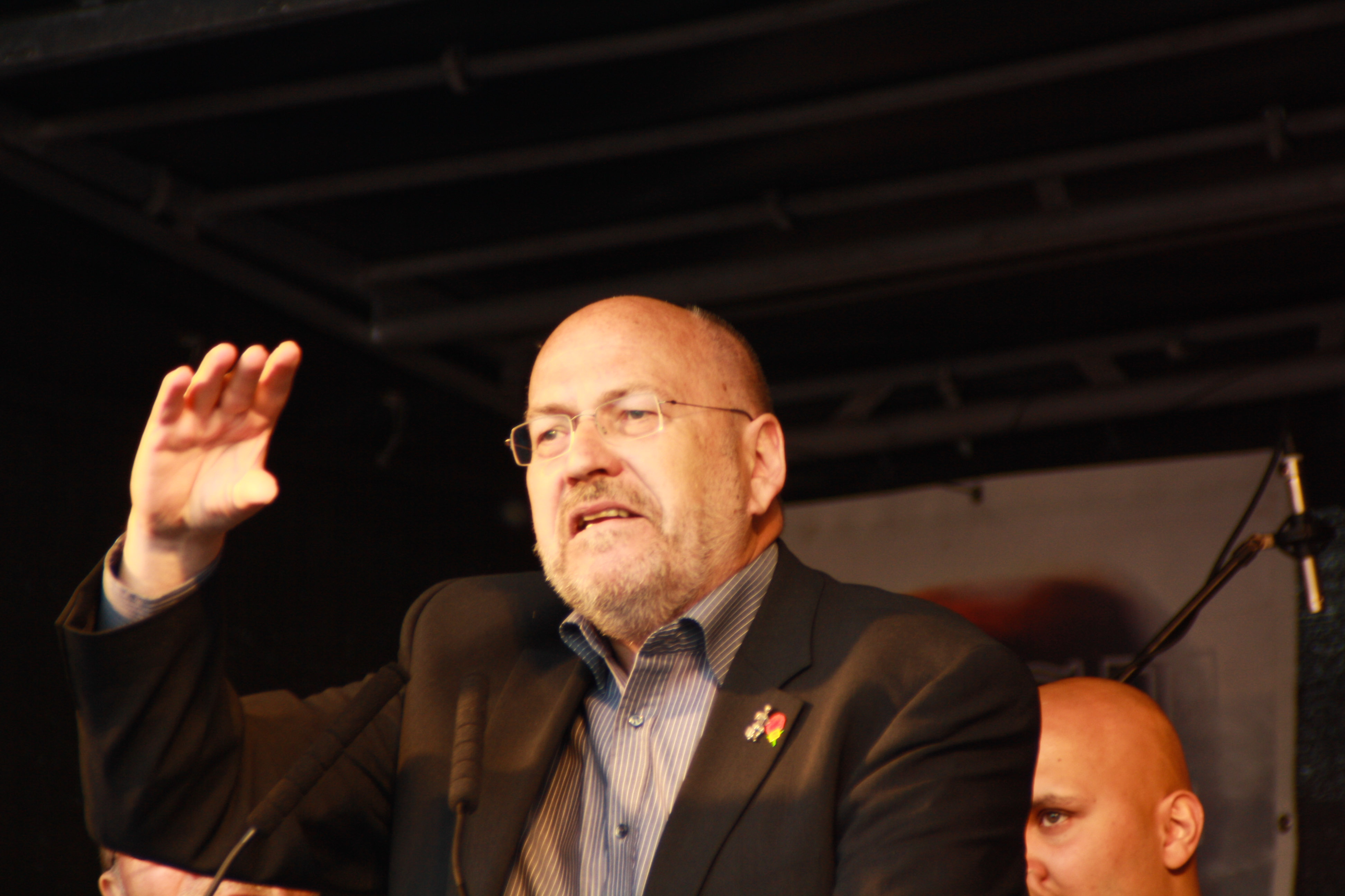 Franz-Josef Möllenberg, NGG, 1.Mai, Duisburg